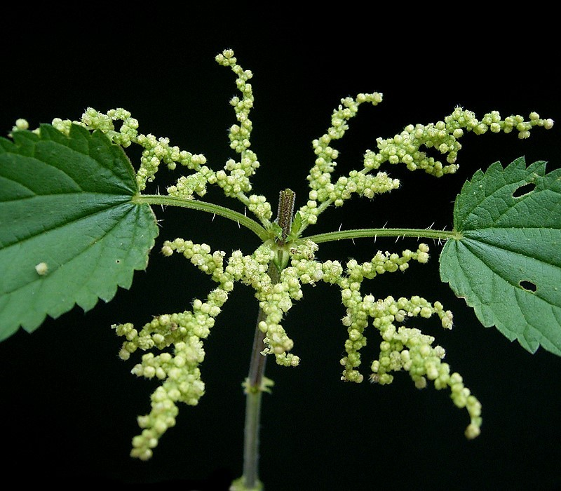 Urtica dioica